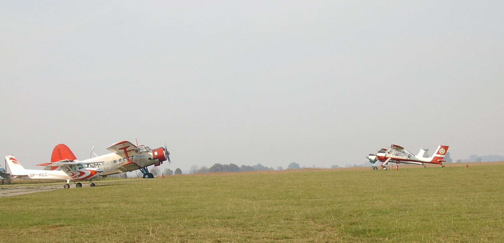 Lotnisko Leszno-Strzyżewice (ICAO airfield code EPLS) - cywilno-sportowe lotnisko usytuowane w miejscowości Strzyżewice w województwie wielkopolskim, ok. 3 km na zachód od centrum Leszna.